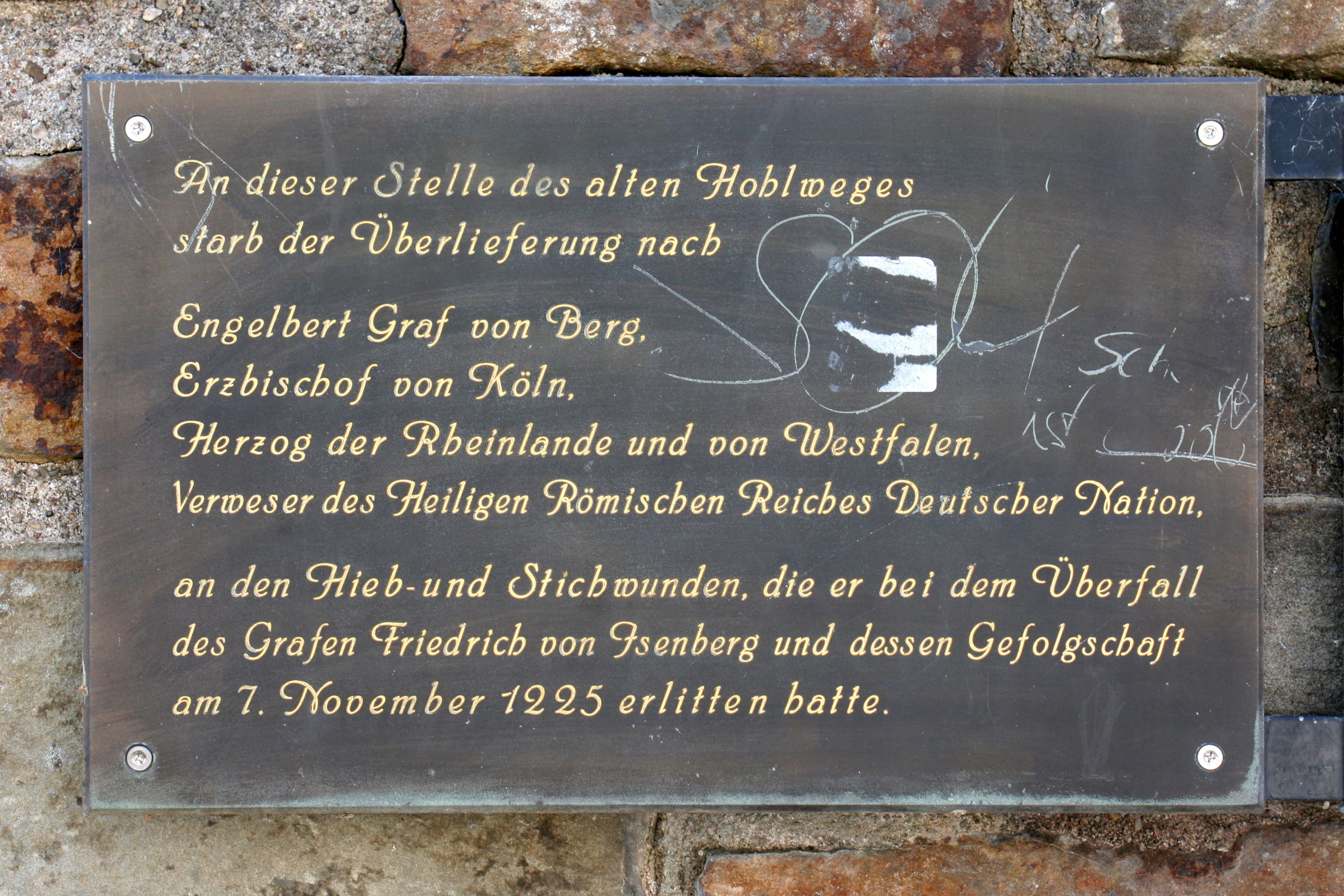 Ort der Ermordung von Engelbert I. von Köln im Jahre 1225, Lindengrabenstraße in Gevelsberg